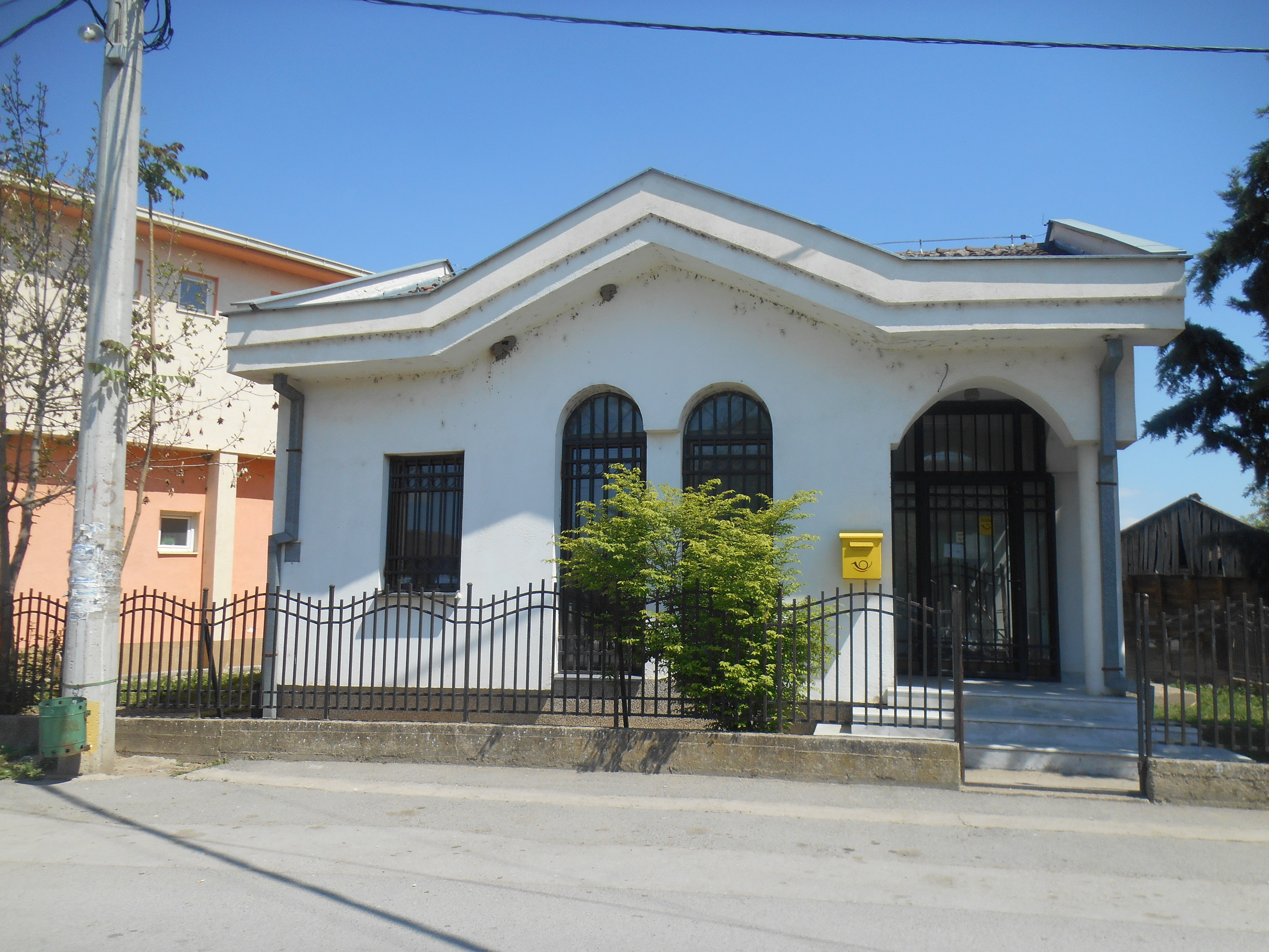 Пошта